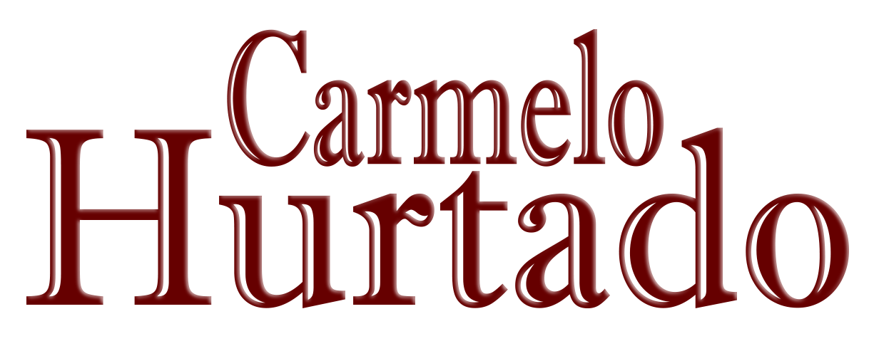 Carmelo Hurtado